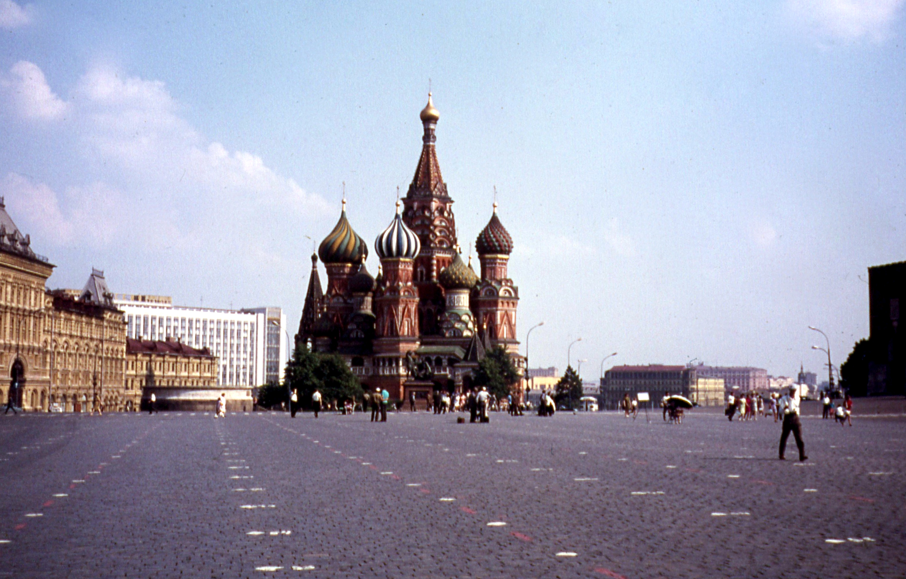 Rode plein met Basiliuskathedraal in Moskou in 1973